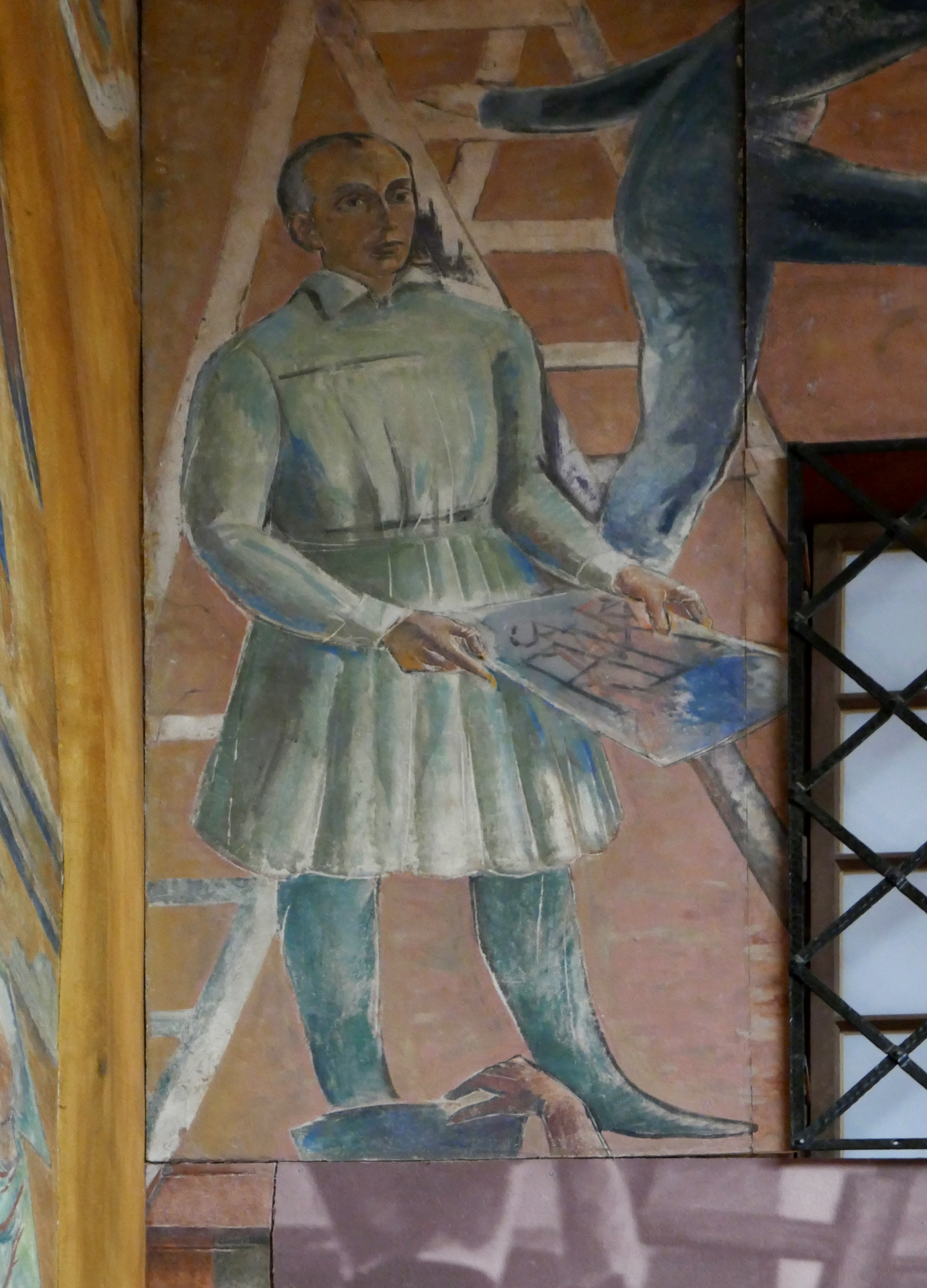 Haus für Mozart (Kleines Festspielhaus) Salzburg, Faistauer-Foyer. Selbstporträt von Anton Faistauer.